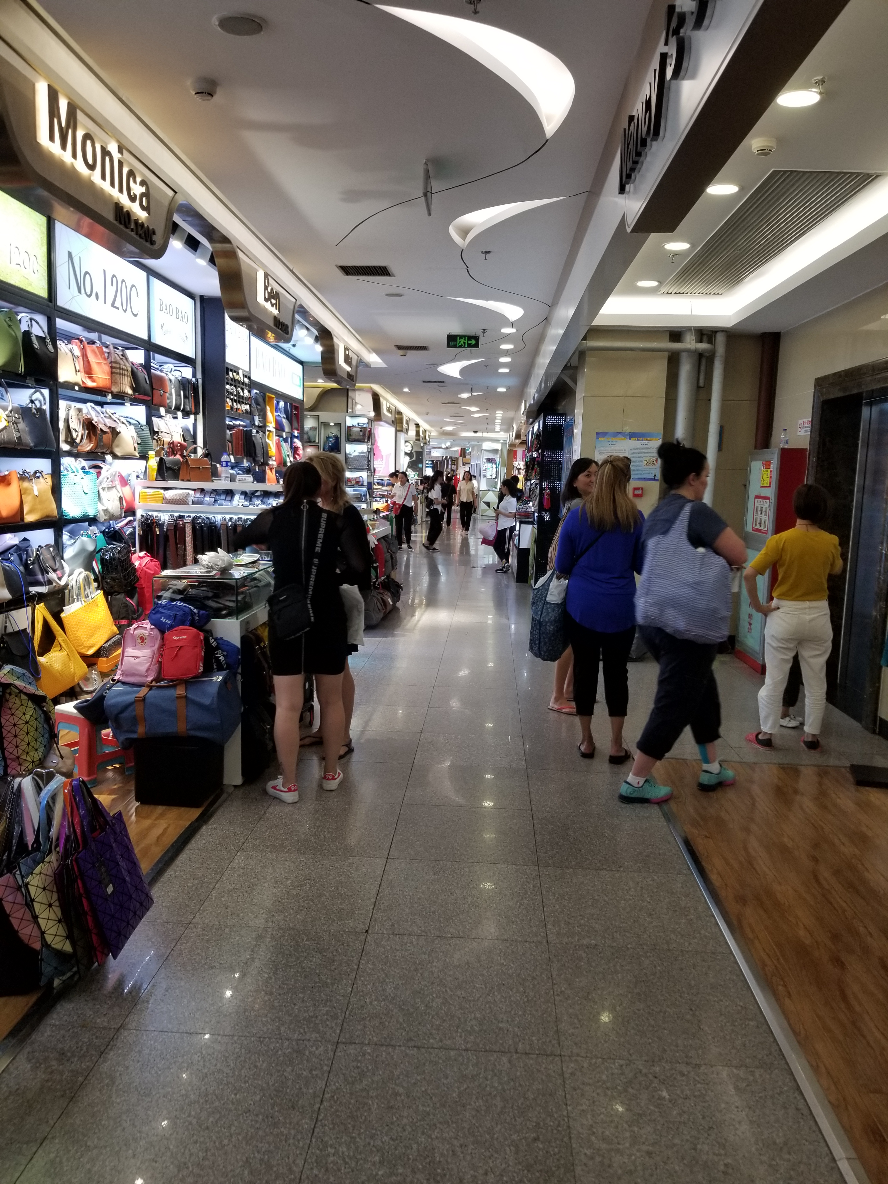 שוק הפנינים בבייג'ינג